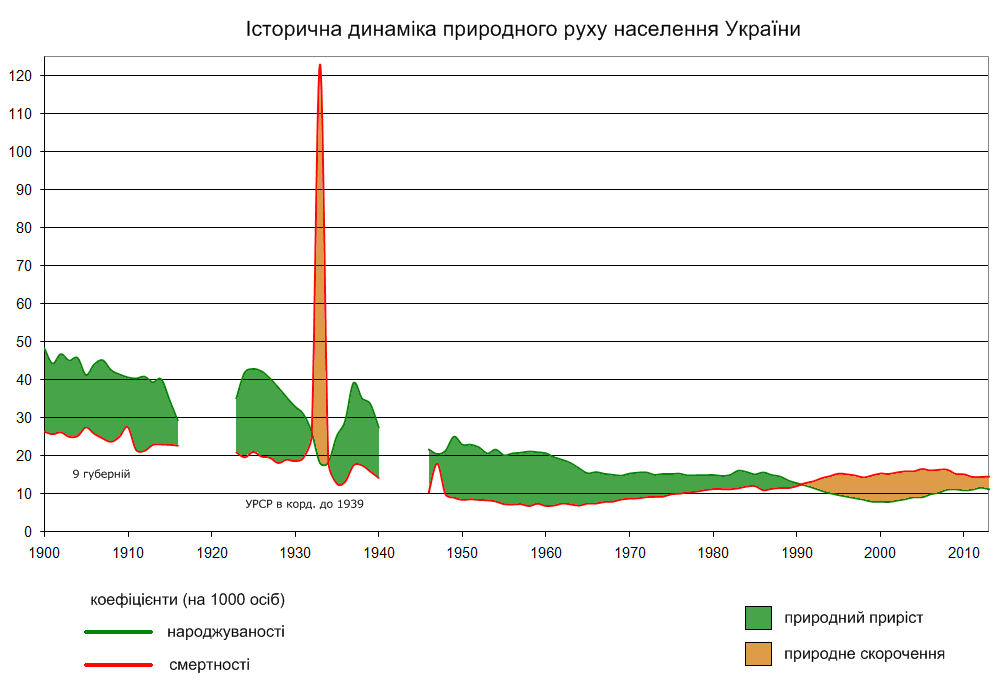 Динаміка народжуваності, смертності та природного приросту в Україні з 1900 р.